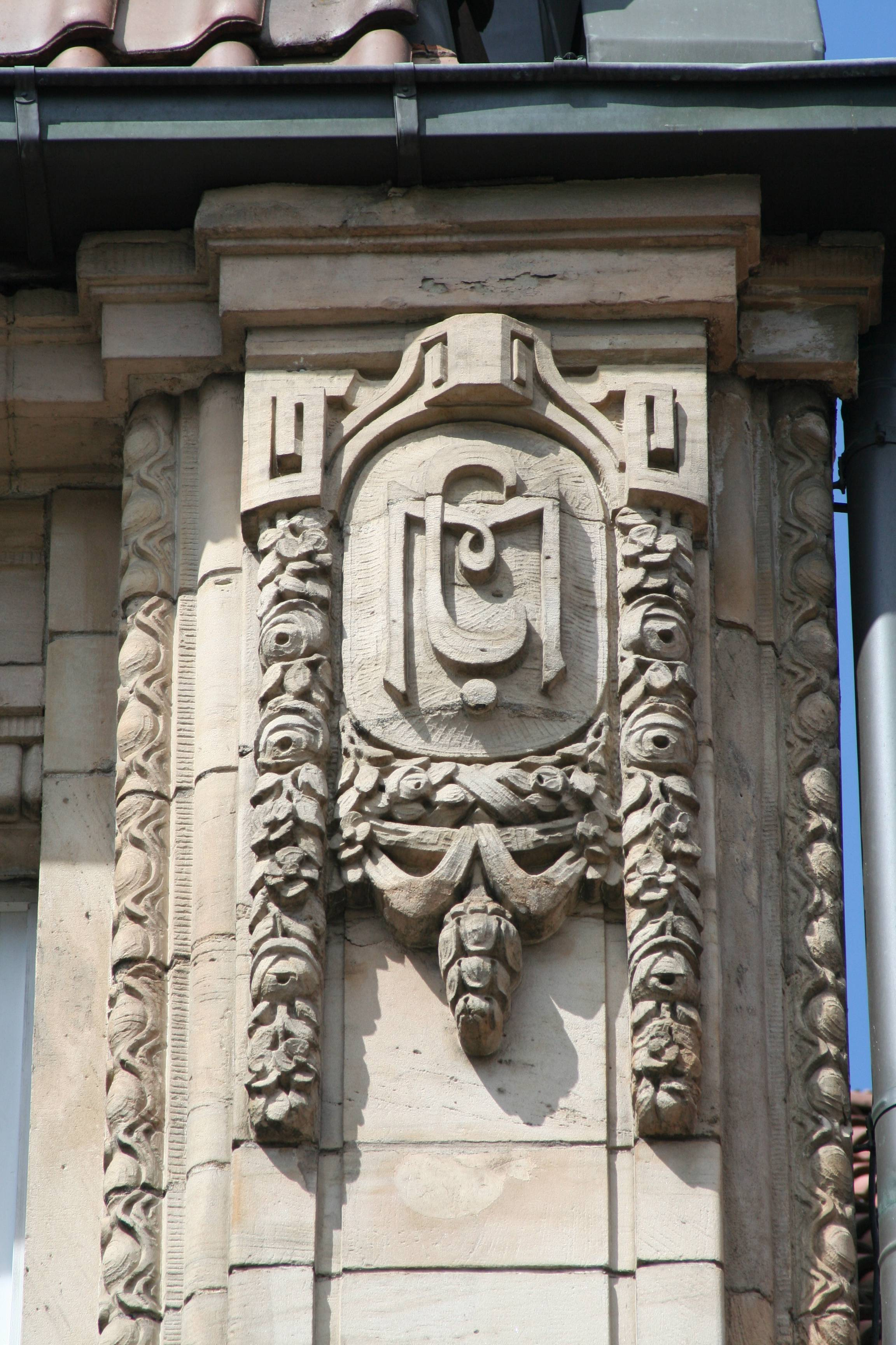 Spitalgasse 19 in Coburg